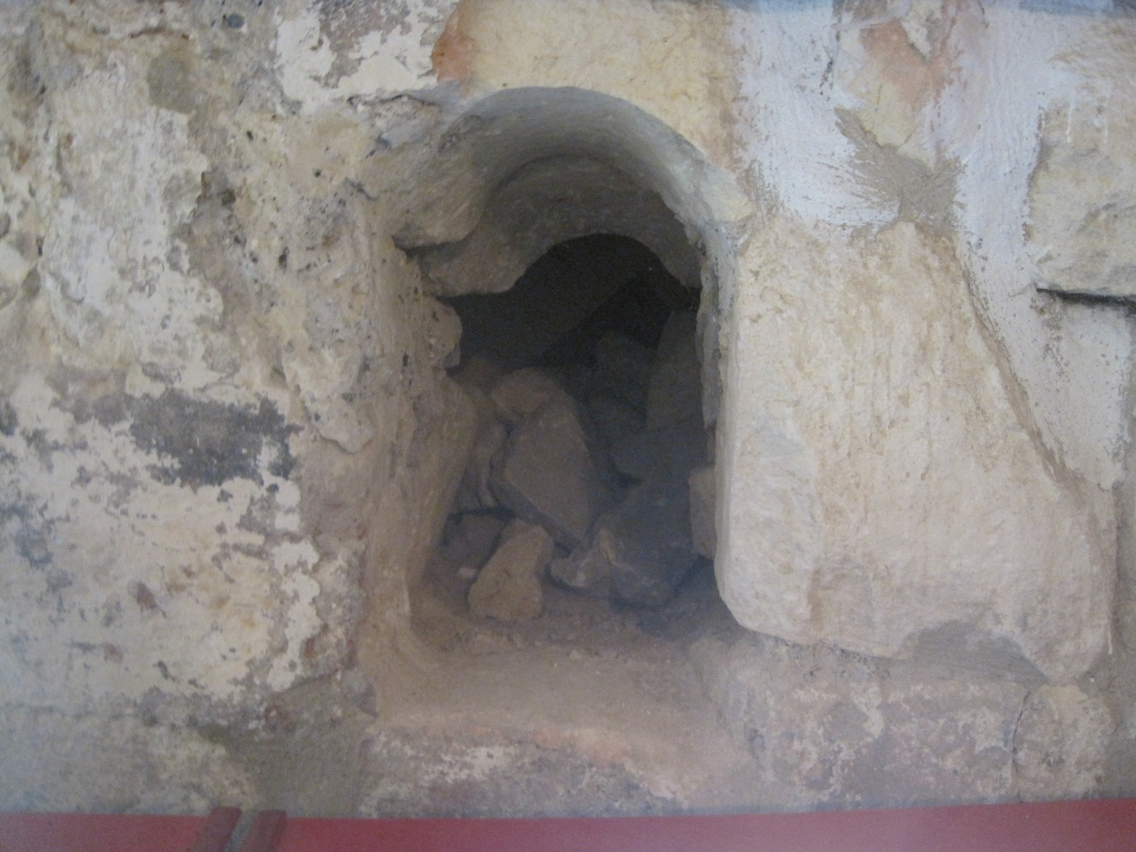 Кремлевские ворота